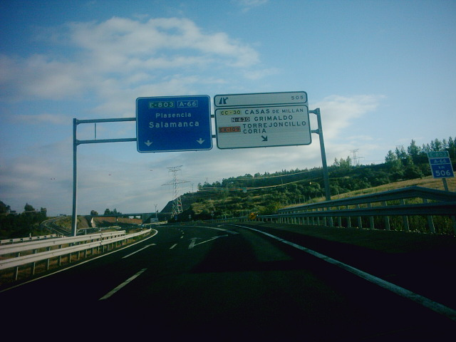 salida de la autovia de la plata